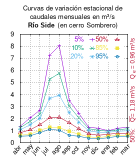 Curva de Variación Estacional Río Side en Cerro Sombrero. # cita publicación # | apellido = Dirección General de Aguas # | nombre = # | enlace-autor = Ministerio de Obras Públicas (Chile) # | título = Diagnóstico y clasificación de los cursos y cuerpos de agua según objetivos de calidad. Cuenca del río Side # | ubicación = Santiago de Chile # | editorial = Ministerio de Obras Públicas (Chile) # | año = 2004 # | edición = # | url = # | urlarchivo = # | fechaarchivo = # | ref = harv # Tabla 4.1: Río Side en Cerro Sombrero (m3/s) pág. 20 mes 5% 10% 20% 50% 85% 95% abr 1.378 1.226 1.069 0.830 0.619 0.523 may 2.068 1.793 1.509 1.085 0.722 0.569 jun 2.695 2.371 2.030 1.509 1.048 0.845 jul 7.238 5.273 3.688 2.077 1.304 1.113 ago 8.045 5.775 3.954 2.118 1.247 1.034 sep 3.517 3.007 2.474 1.670 0.955 0.631 oct 2.465 2.087 1.707 1.162 0.723 0.548 nov 1.273 1.149 1.008 0.765 0.507 0.374 dic 1.201 1.039 0.872 0.624 0.413 0.325 ene 1.000 0.937 0.860 0.714 0.533 0.427 feb 1.196 1.078 0.955 0.769 0.604 0.529 mar 1.289 1.154 1.013 0.799 0.610 0.524 This plot was created with Gnuplot.